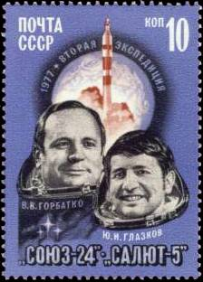 Космонавты СССР Горбатко и Глазков